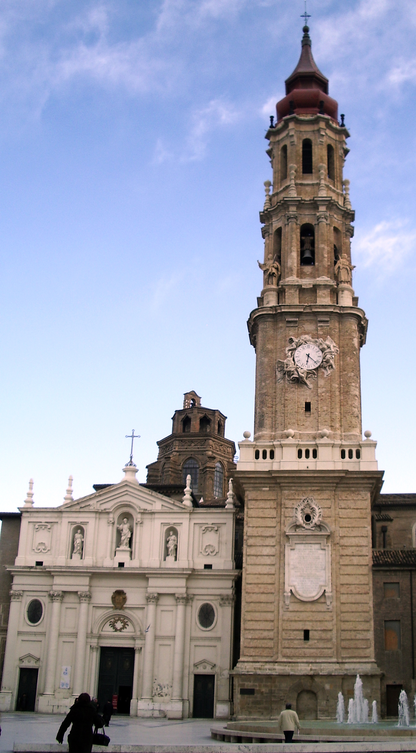 Fachada de la Seo (abril de 2007)